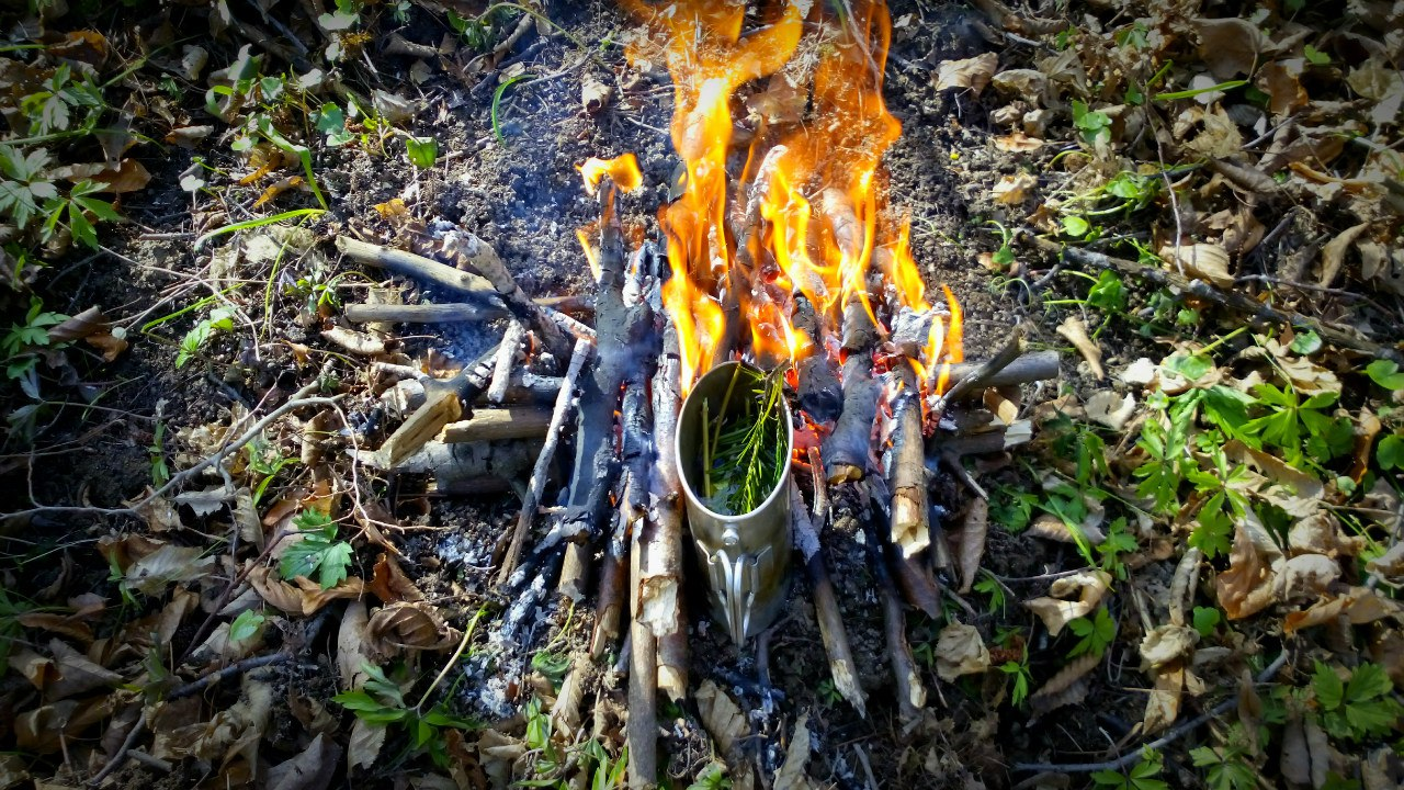 Для приготування лісового чаю підходять гілки хвойних дерев (ялини, сосни, ялівця, піхти), пагони малини, лісові ягоди, квіти лікарських рослин тощо.